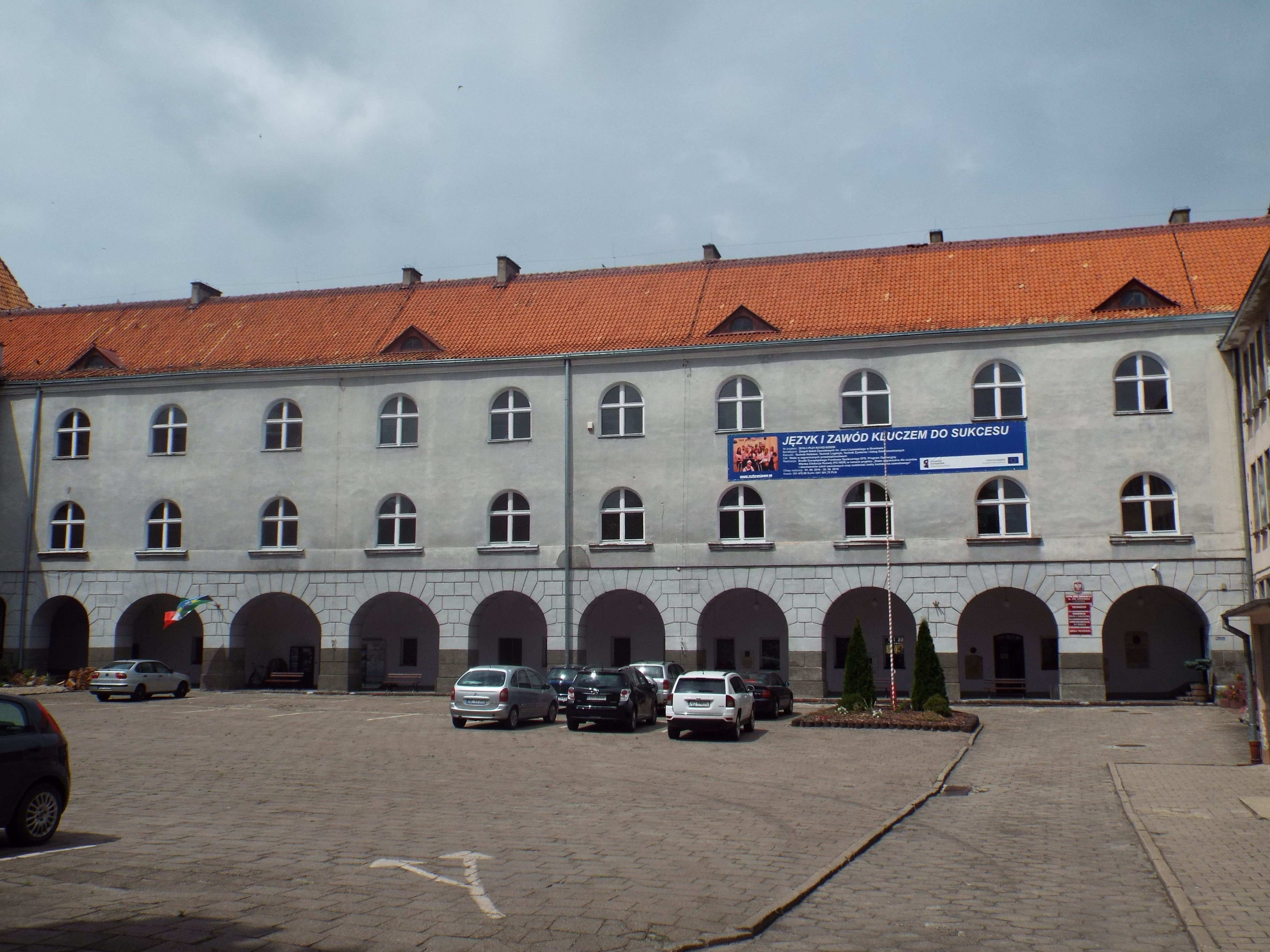 Braniewo - Kolegium Jezuitów / Colegium Hosianum